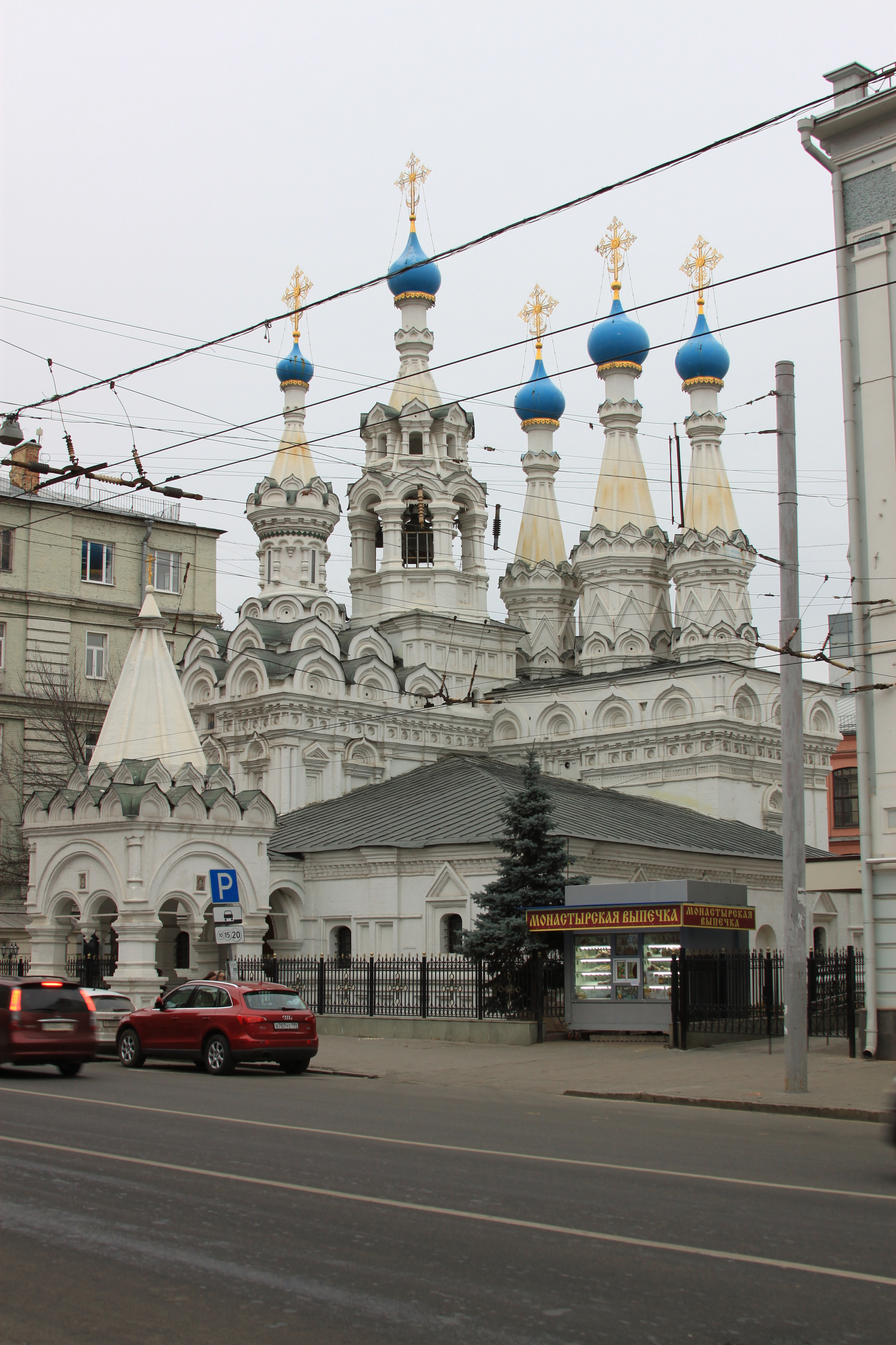 Церковь Рождества Богородицы в Путинках 2014 Moskva Nativity Church at Putinki